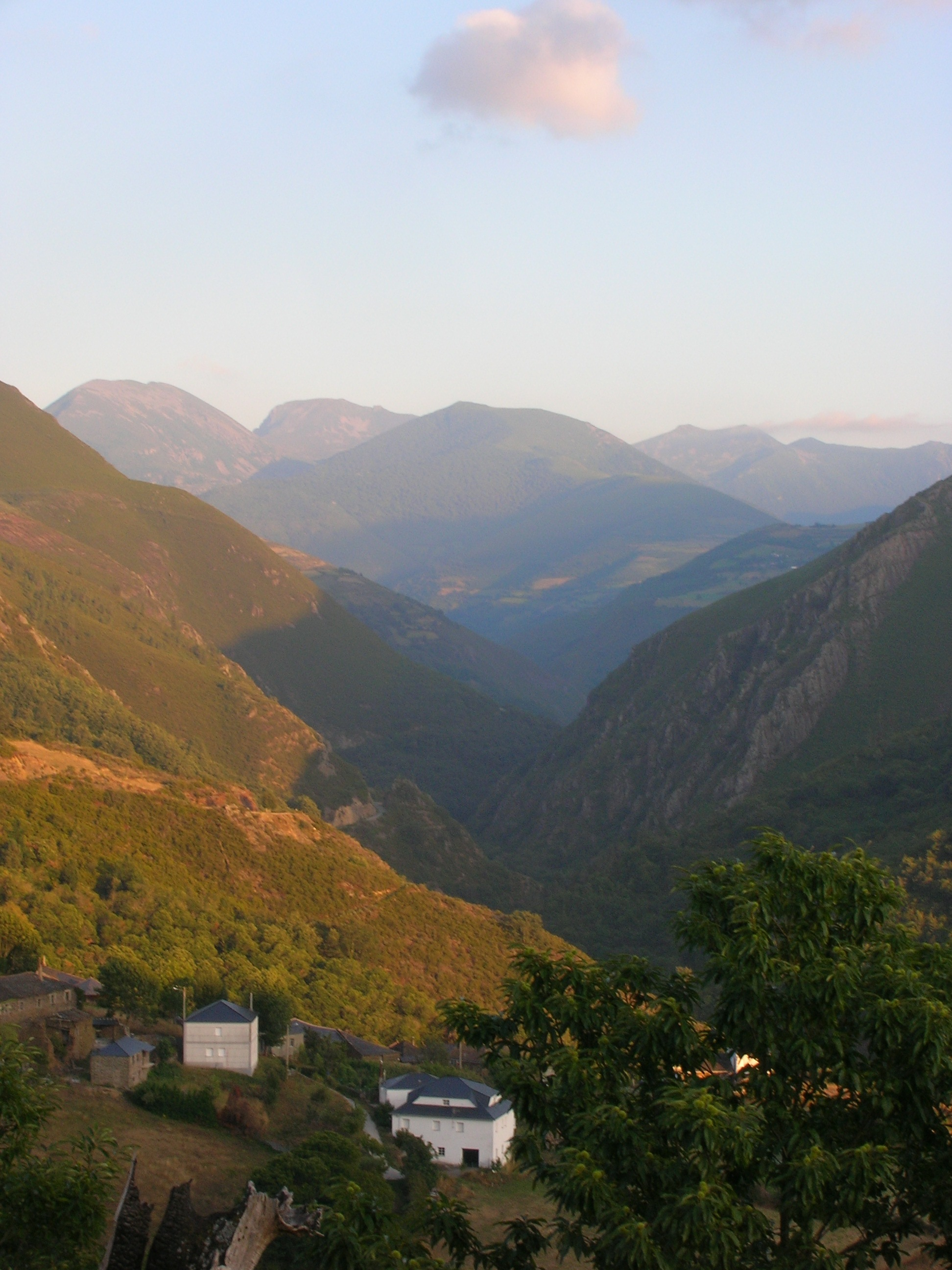 Vista del valle del río Ser a proximidad de la parroquia de Castelo, en el municipio de Navia de Suarna. En primer término, al fondo, la cumbre del Pico da Torre (1 107m) y en plano posterior, las de Mustallar ( 1 924 m) y Tres Bispos ( 1 792 m)